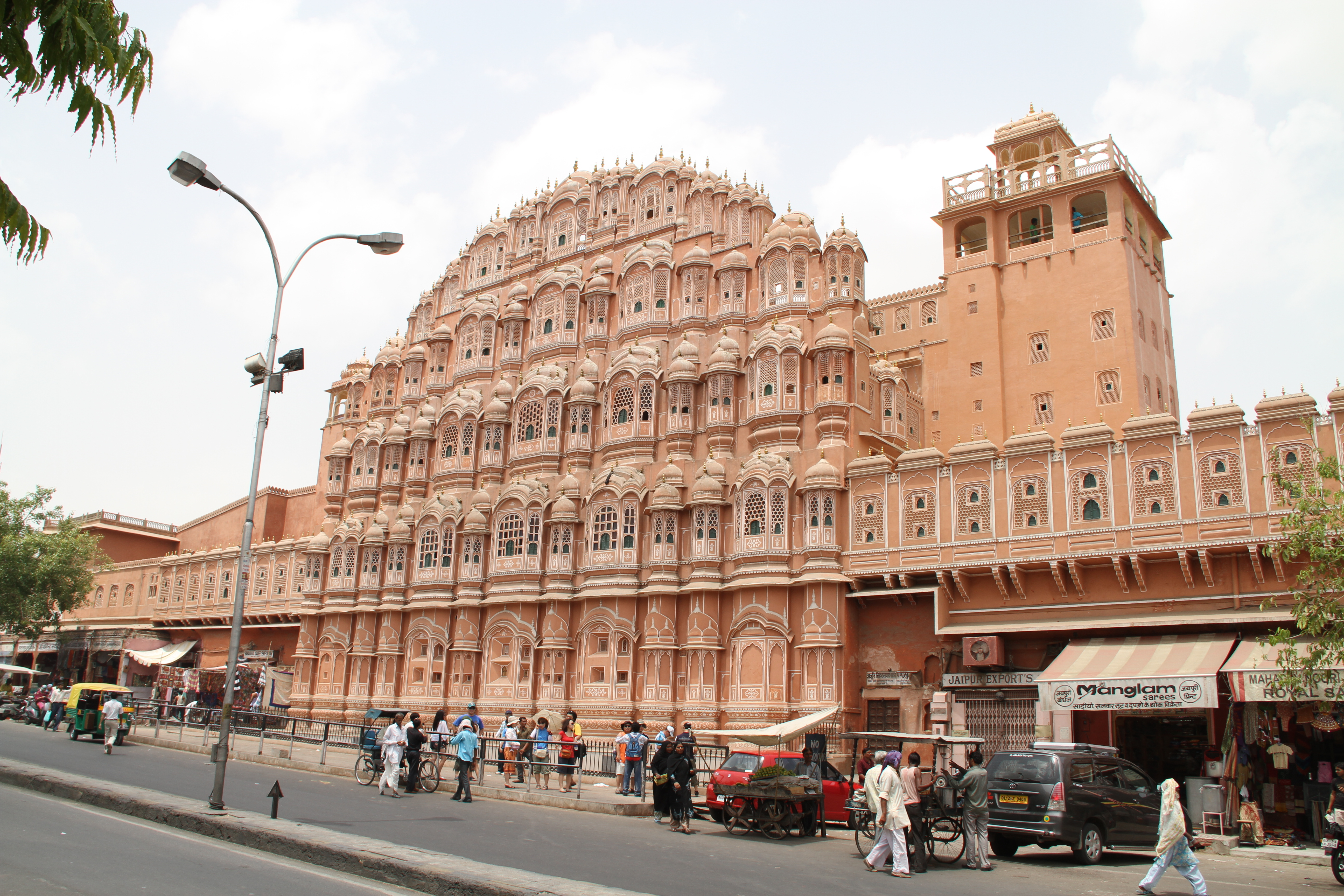 Дворец ветров в Джайпуре (Фронтальный фасад — 2010 г.)